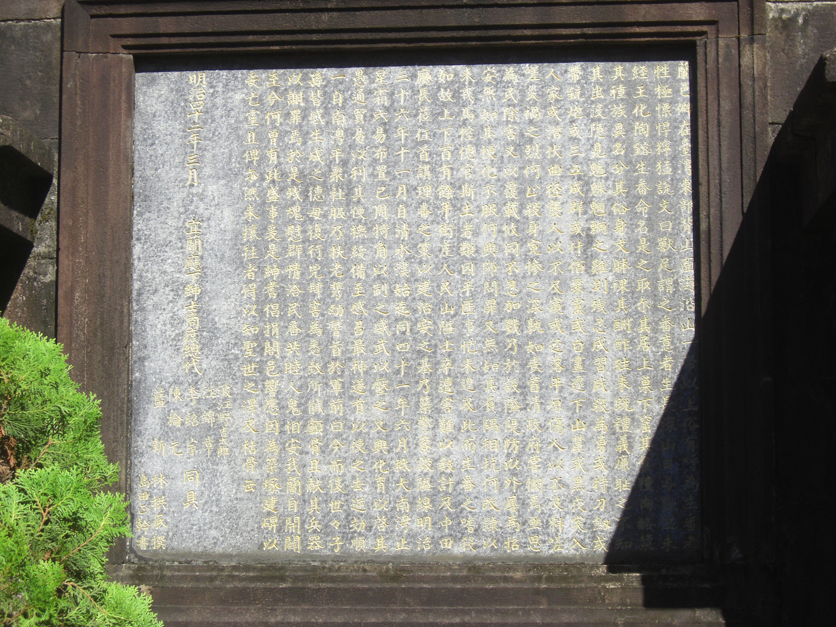 中文（台灣）: 臺灣省宜蘭縣縣定古蹟獻馘碑碑文。